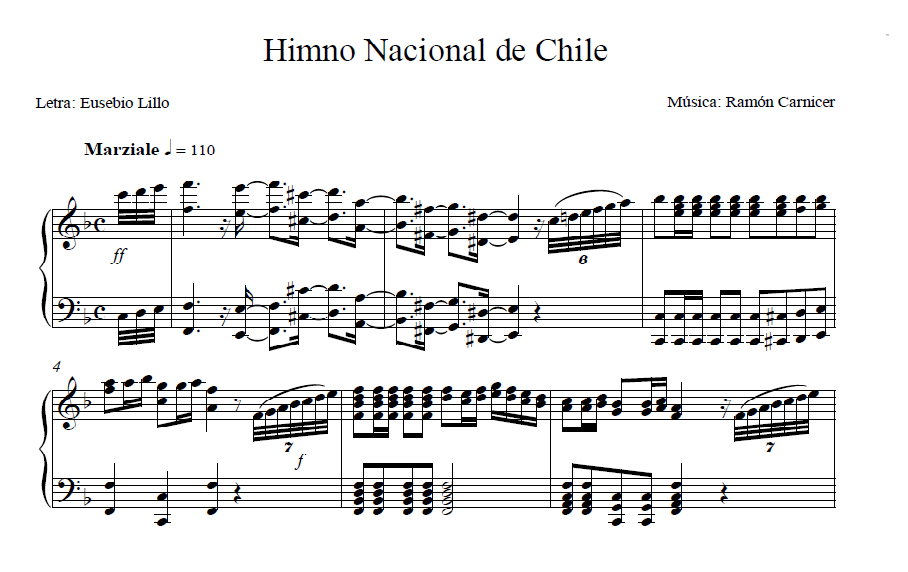 Los primeros compases del Himno Nacional de Chile, en un arreglo para piano en fa mayor, según la tonalidad original compuesta en 1827 por el músico catalán Ramón Carnicer i Batlle. Imagen creada por Victorddt usando Siblelius 6, en base a un antigua fotocopia. Imagen en contenido libre.